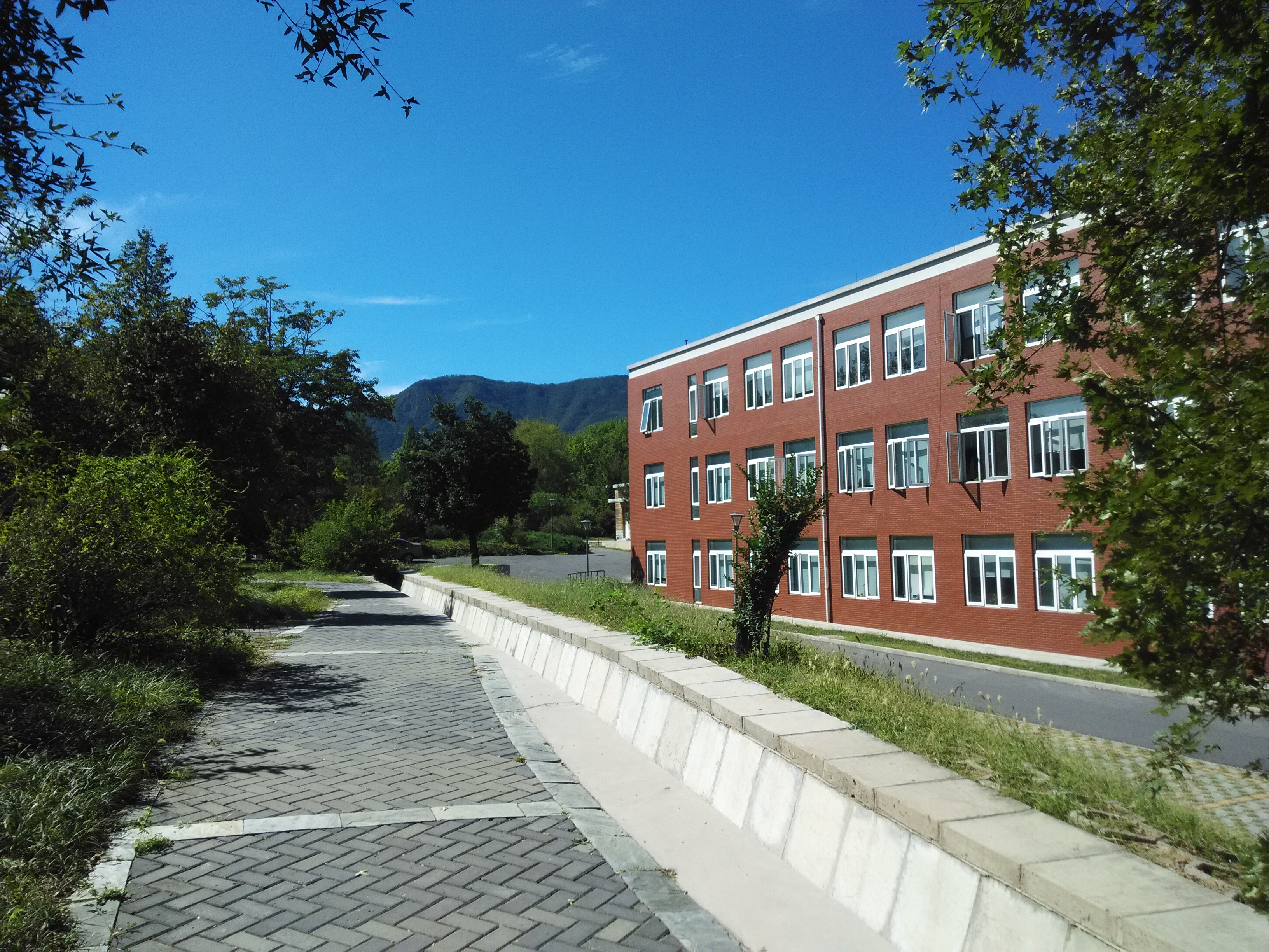 中文（中国大陆）: 植物所的一个建筑，用于科研。